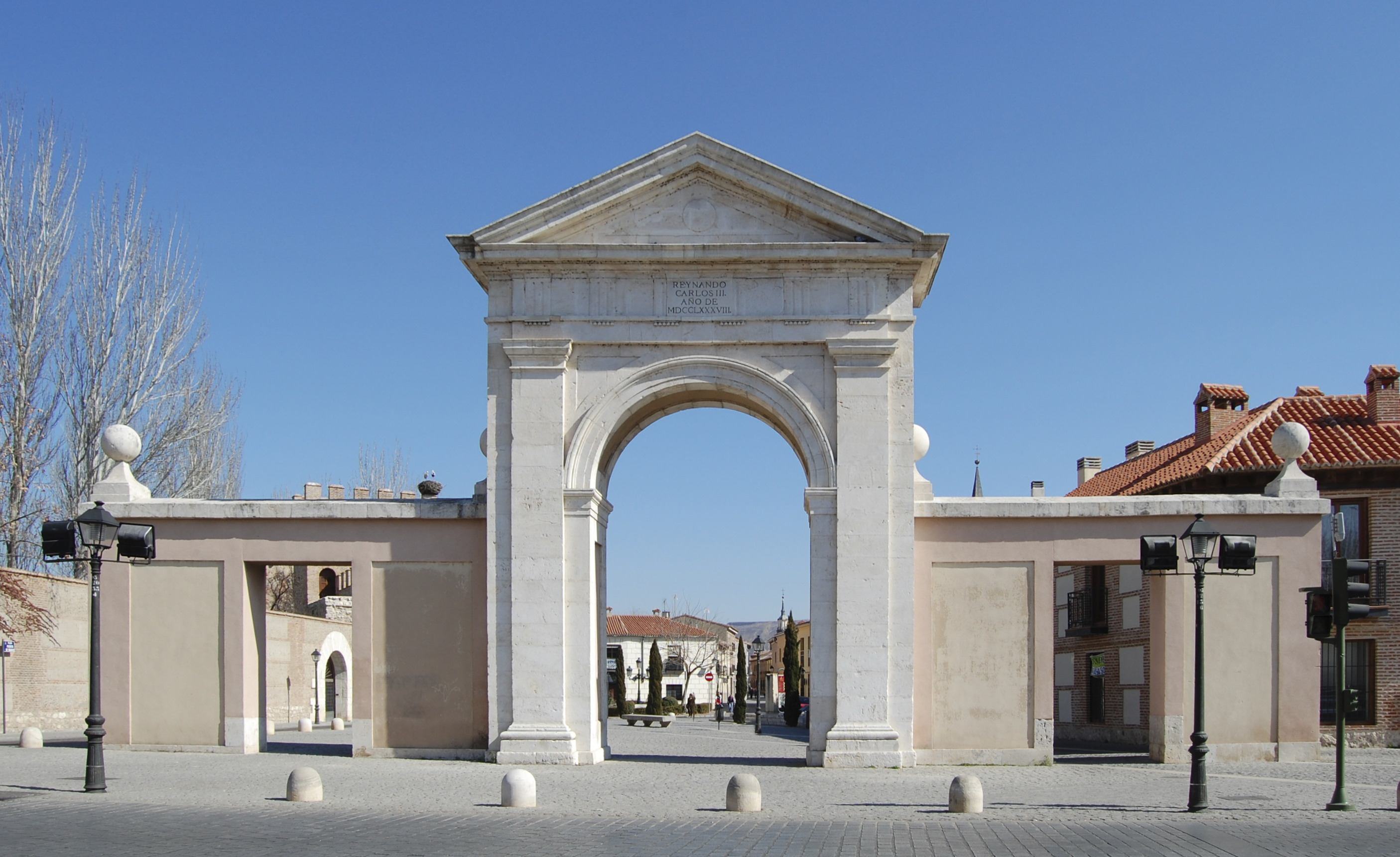 Fachada oeste de la Puerta de Madrid en Alcalá de Henares (Comunidad de Madrid - España). Reedificación de 1788 para sustituir a una de las puertas medievales del antiguo recinto amurallado. La costeó el Cardenal Lorenzana (arzobispo de Toledo), reinando Carlos III. Dirigió las obras el arquitecto Antonio Juana Jordán.